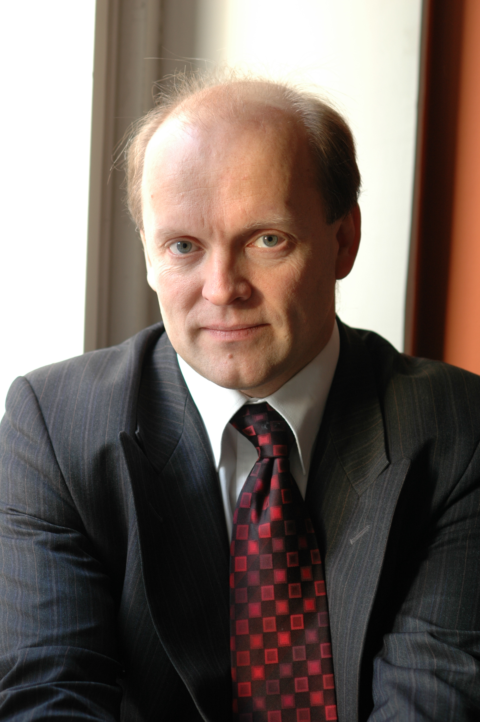 Jan Rydman, suomalaisen tiedevalistuksen vaikuttaja, 2005.